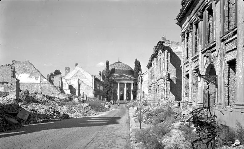 Potsdam.- Französische Straße nach 1945